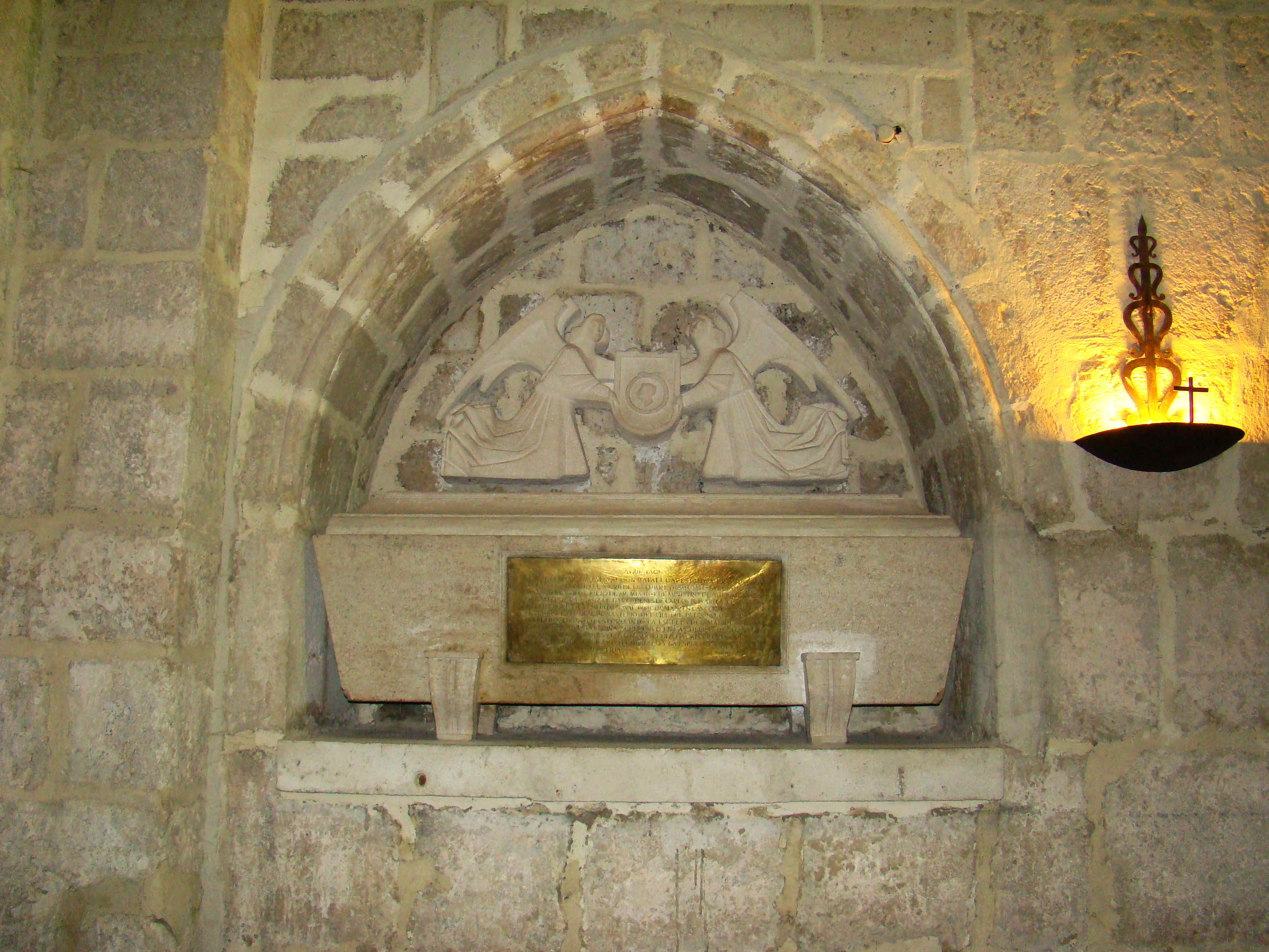 Monasterio cisterciense de la Santa Espina ubicado en la localidad menor llamada La Santa Espina del municipio de Castromonte en la provincia de Valladolid, España. Sepulcro en lucillo (capilla de San Rafael) de Rafael Cabestany, ministro de agricultura, promotor y mecenas de la restauración del monasterio.